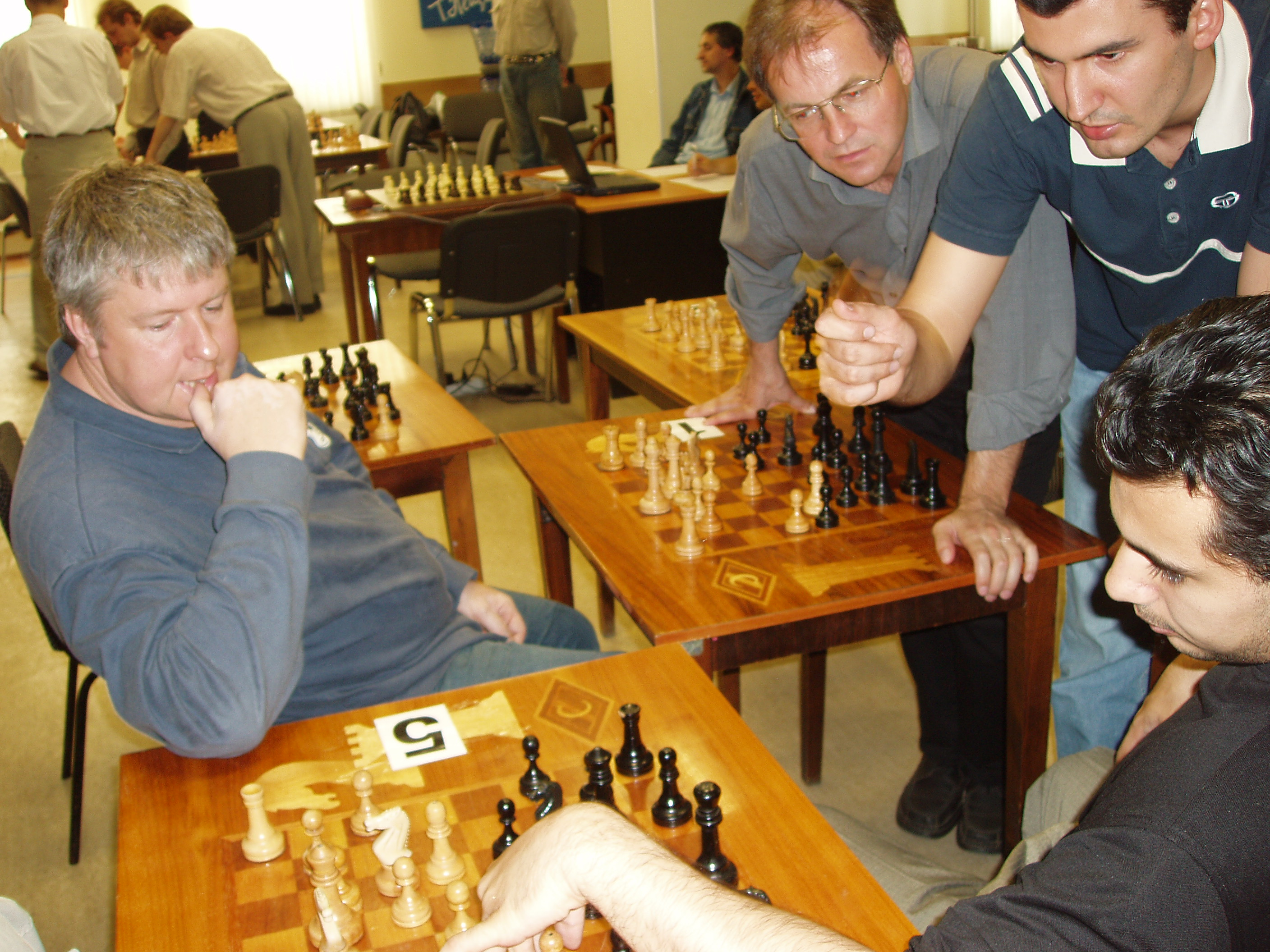 Обсуждение команды "Черных" в 1-й партии по Деловым шахматам между командами ШФМ и Мэрии Москвы 11.06.2005г.